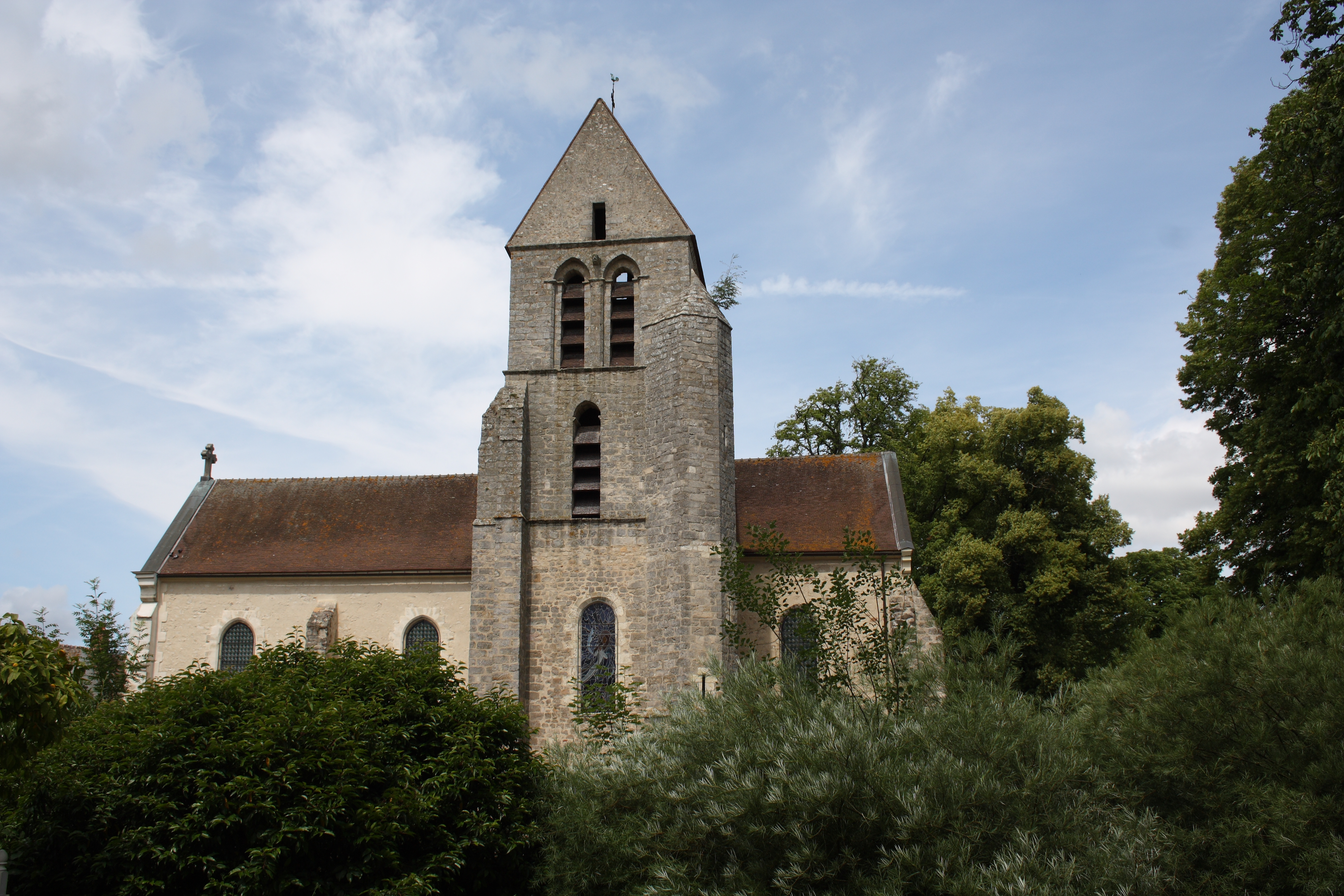 katholische Kirche Saint-Quentin in Chamarande